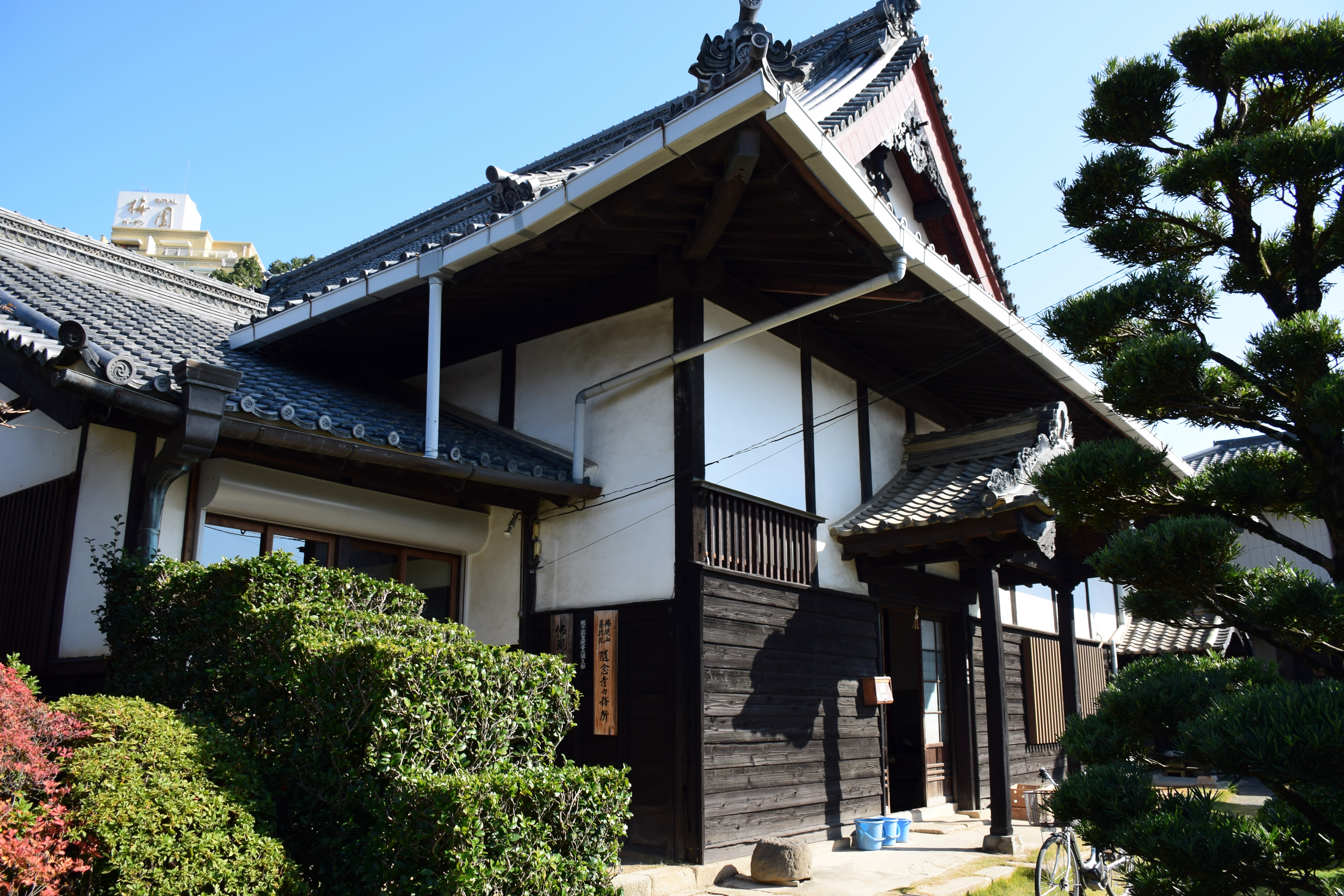 随念寺庫裡